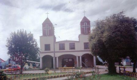 Descripción: Plaza e iglesia de Puqueldón. Autor: Roberto Bahamonde. Fecha: ene. 1999 Lugar: Puqueldón, Isla Lemuy, Chiloé, Chile